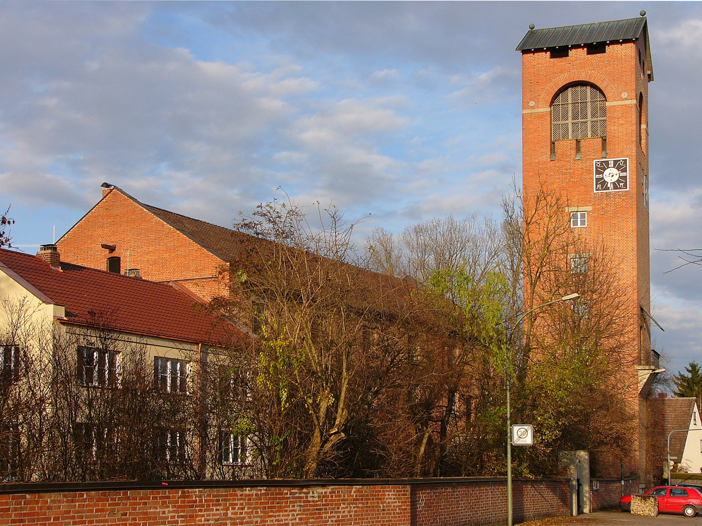 Evang.-Luth. "Erlöserkirche"; Backsteinbau mit freistehendem Campanile; mit Ausstattung; angebautes Pfarrhaus, zweigeschossiger Satteldachbau; Garage; 1960-1963 von Hans Döllgast.This is a photograph of an architectural monument.